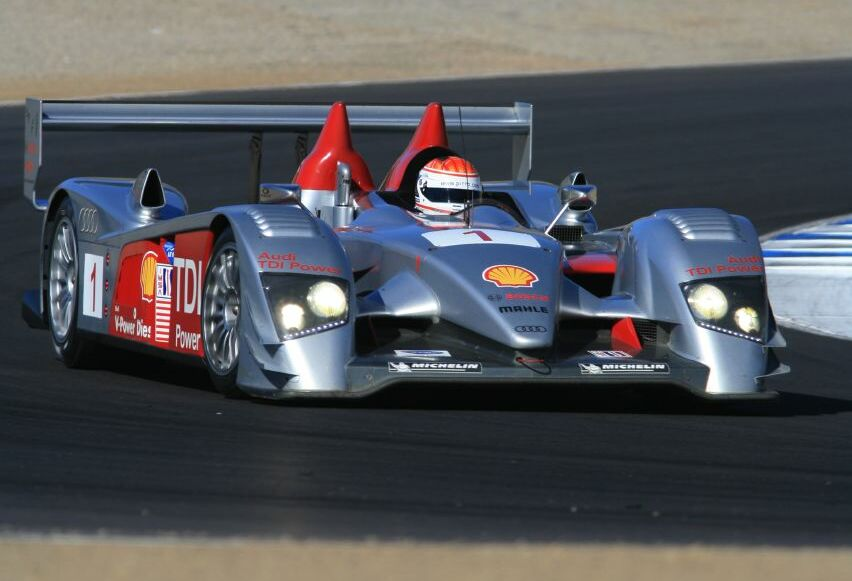 Audi R10